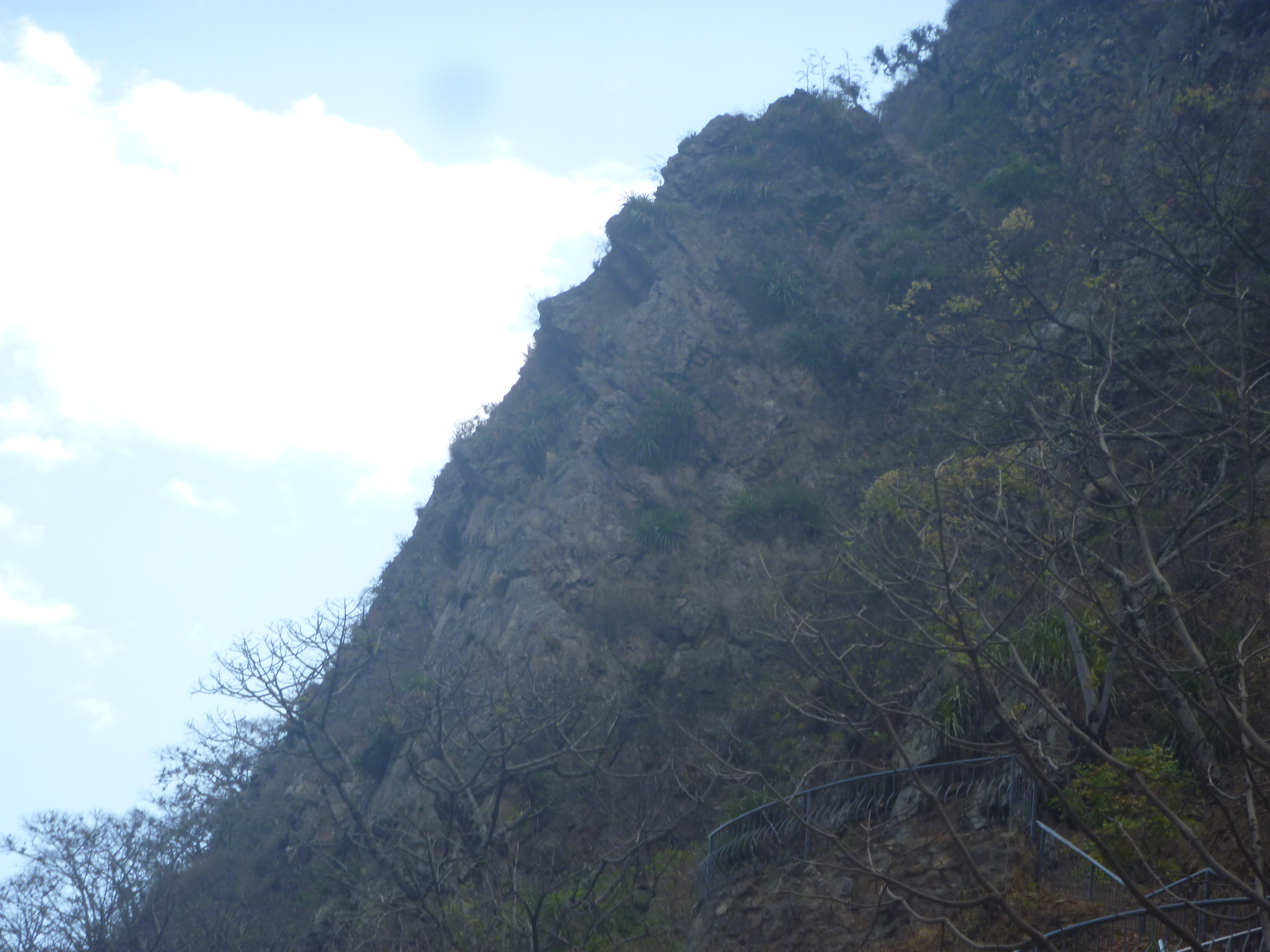 Atractivo turístico de Cascas.